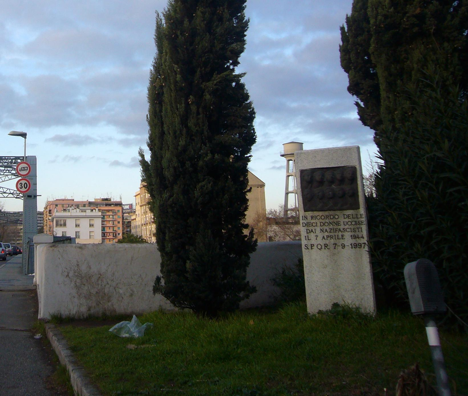 Roma, quartiere Ostiense: lapide in memoria delle 10 donne trucidate dai nazisti il 7 aprile 1944 al Ponte dell'Industria